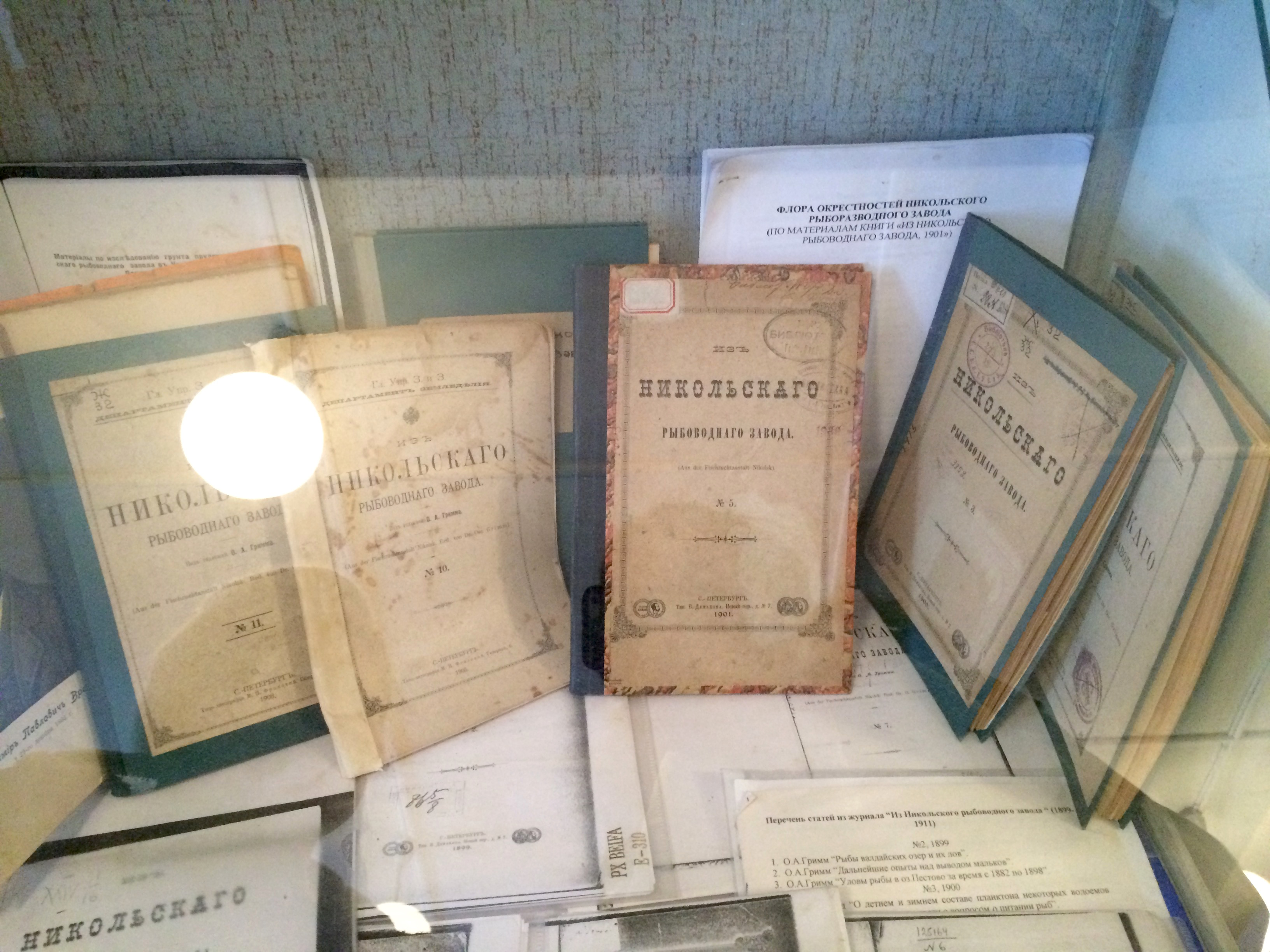 Всего успело выйти 6 номеров